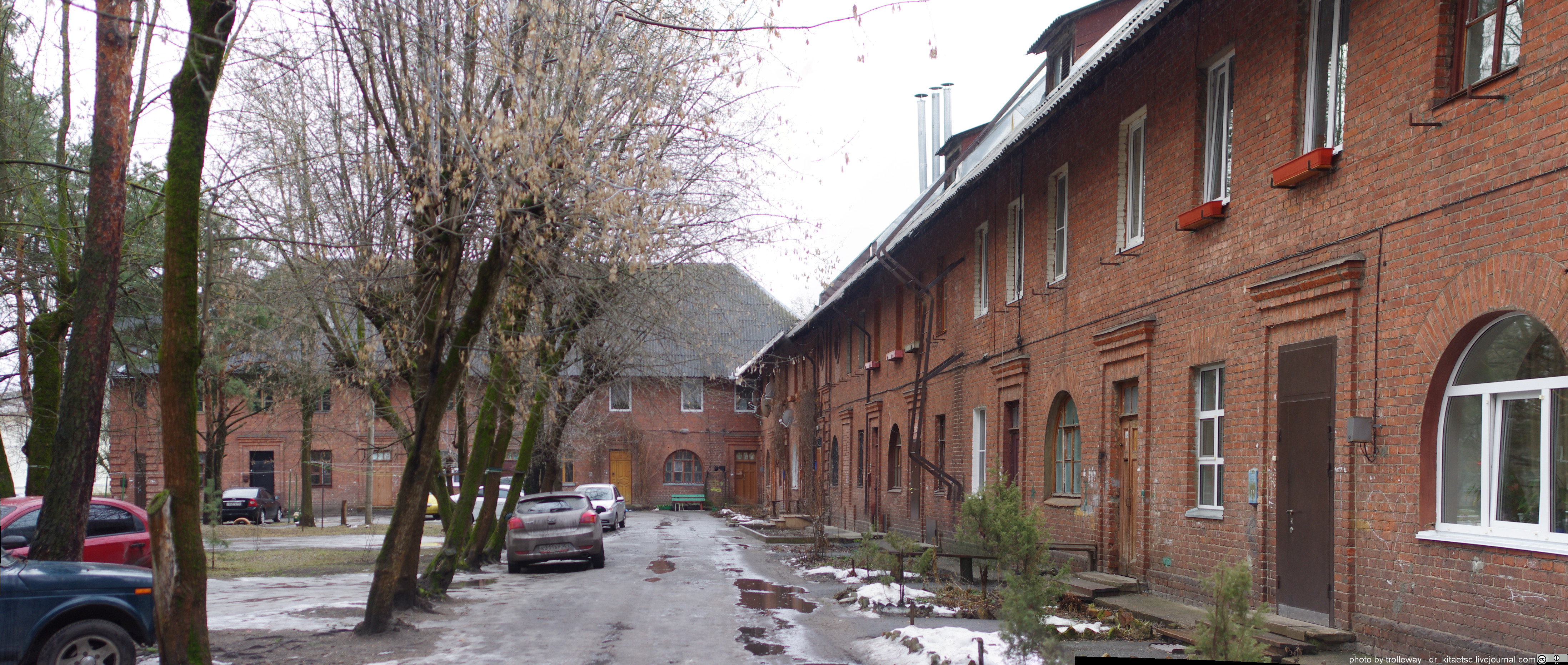 Moscow oblast, Shatura. 1920-1930s. Московская область Шатура 1920-1930-е